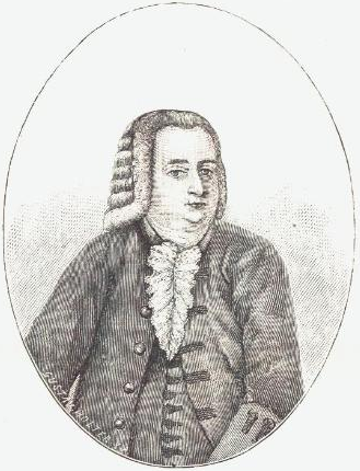 Den norske handelsmannen Christian Anker.